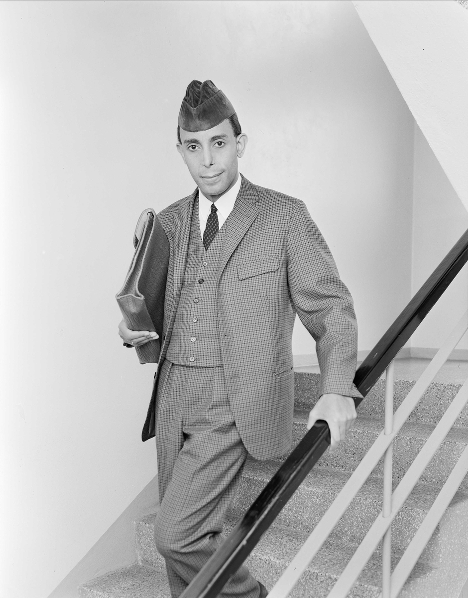 Emanuel Minos (født 1925 i Belgisk Kongo) er en norsk teolog og forkynner tilknyttet den norske pinsebevegelsen.